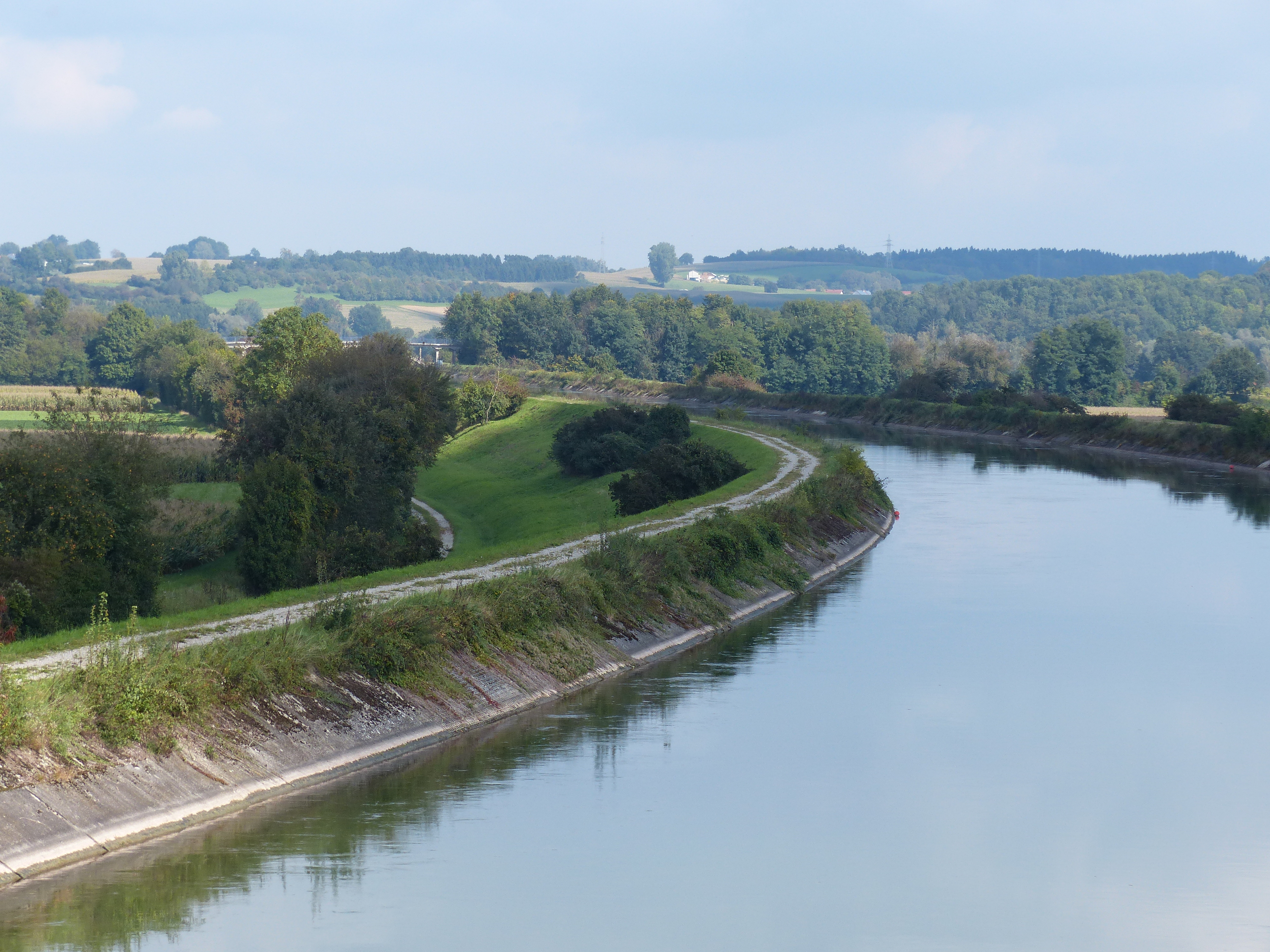 Isarkanal bei Wartenberg, stromabwärts